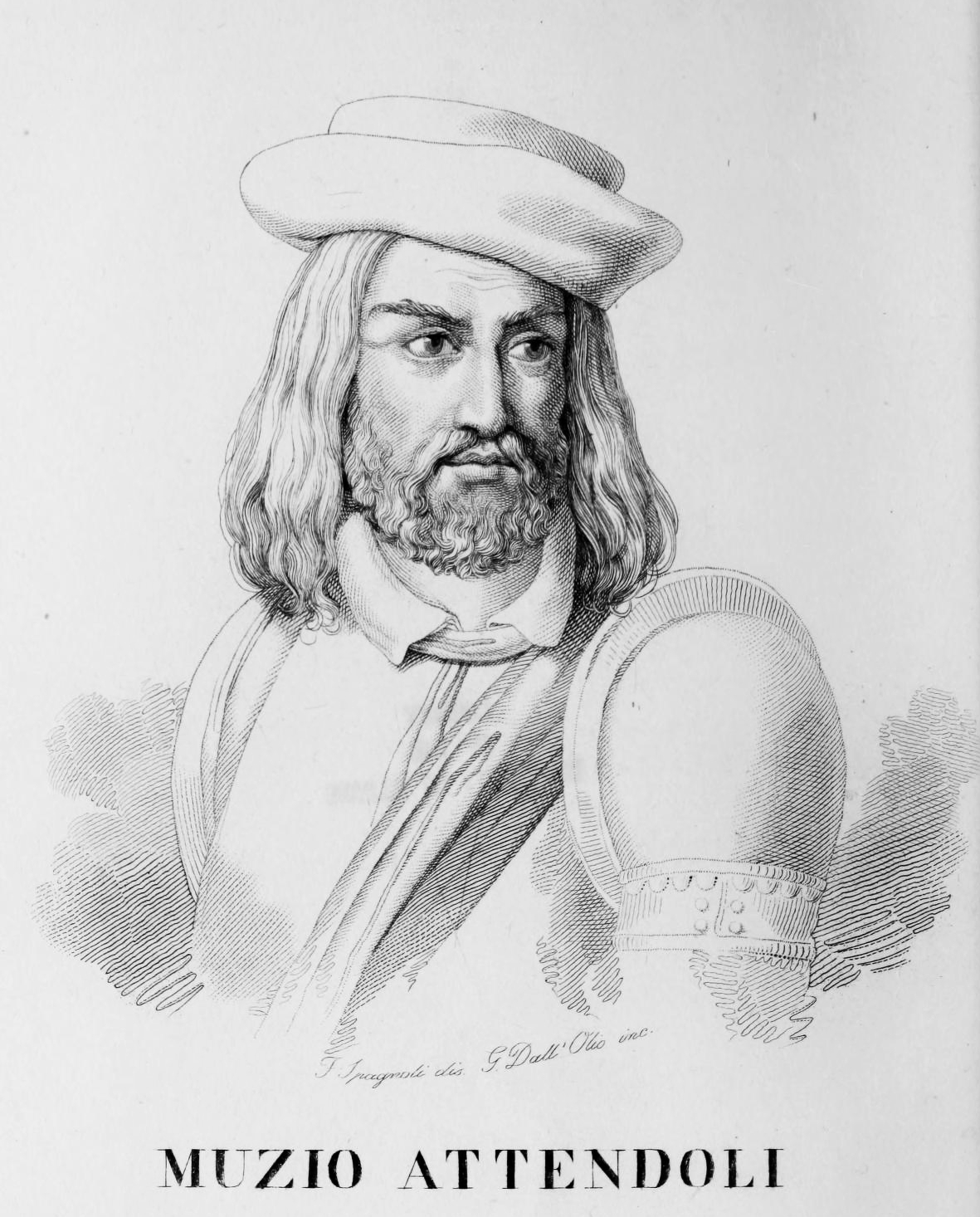 Muzio Attendoli Sforza